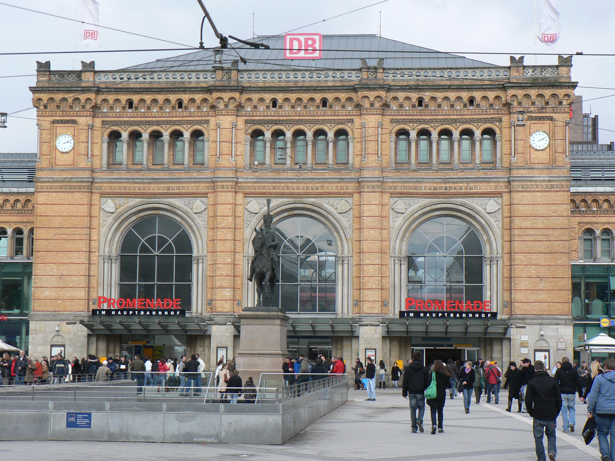 Vorplatz des Hannoveraner Hauptbahnhofes